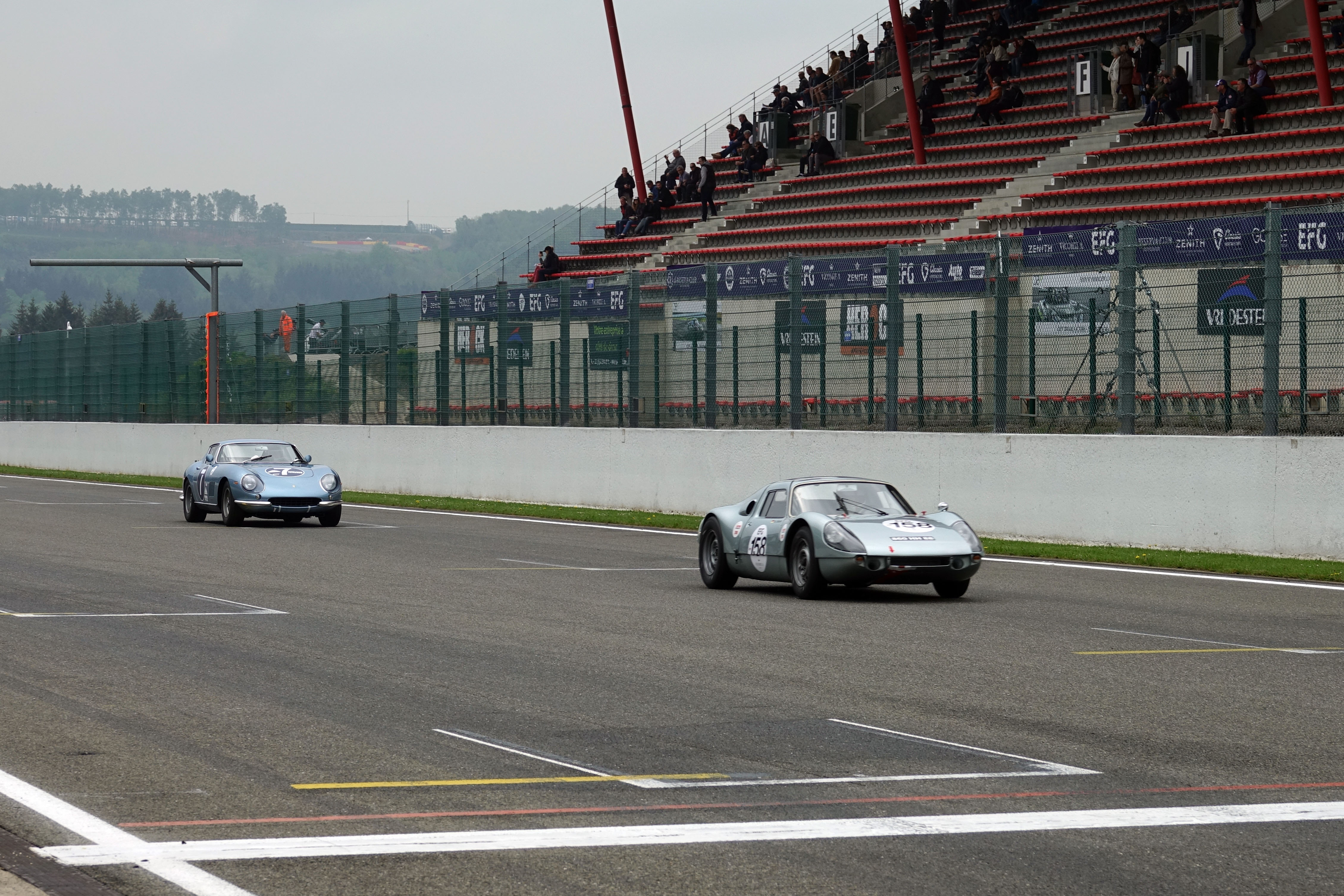 Spa Classic 2019 - The Greatest’s Trophy